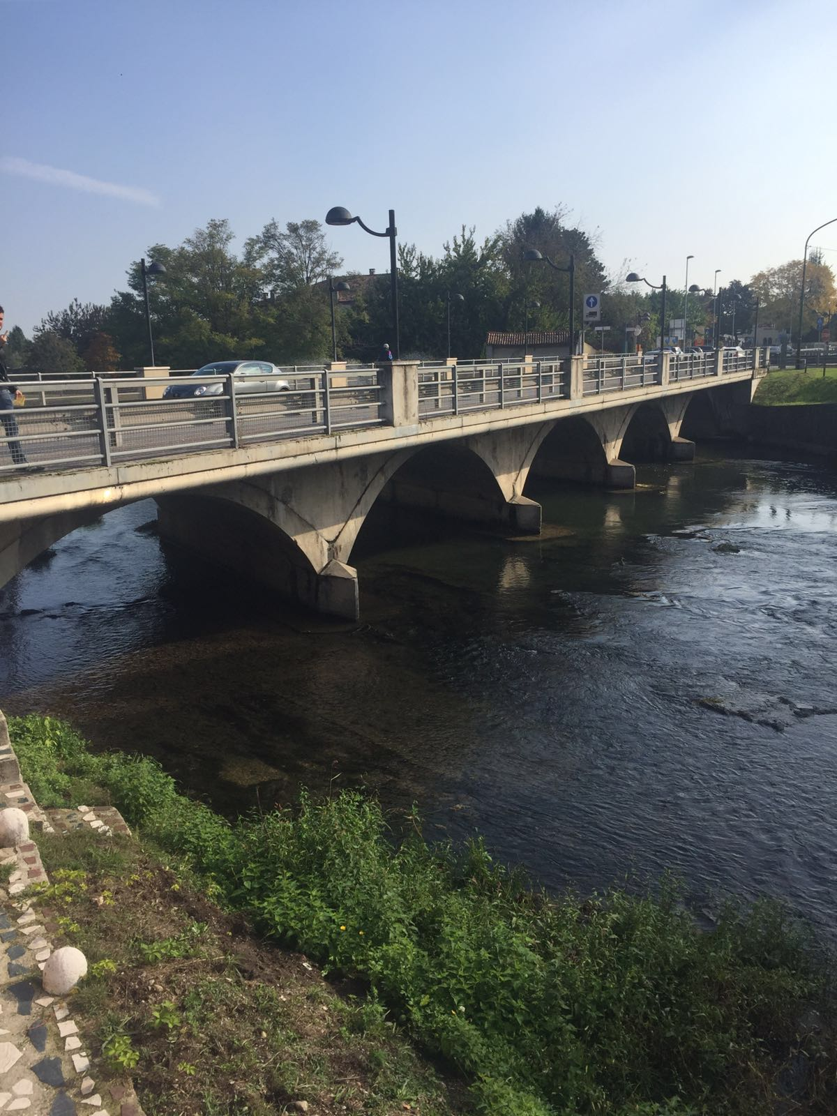 Il Ponte della Gloria di Goito, provincia di Mantova.